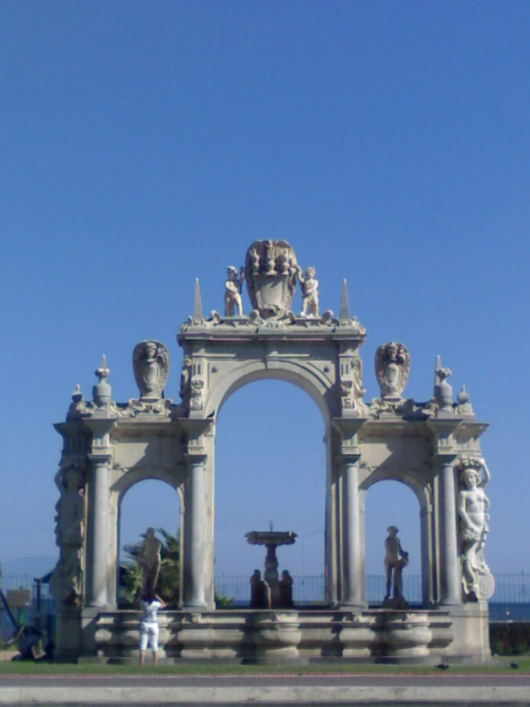 Fontana del Gigante, Naples, Italy